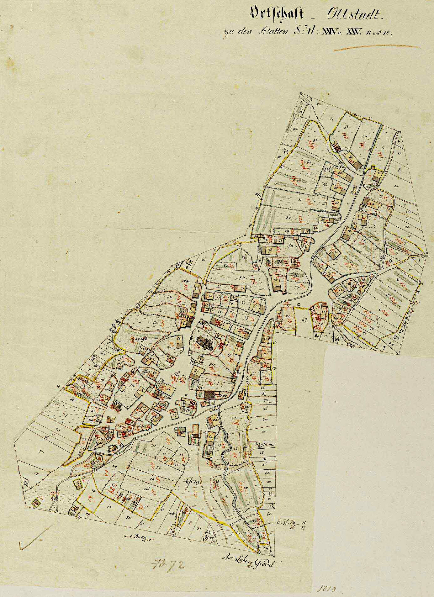 Historische Ortskarte von Ohlstadt von 1810. Maßstab: 1:2500.